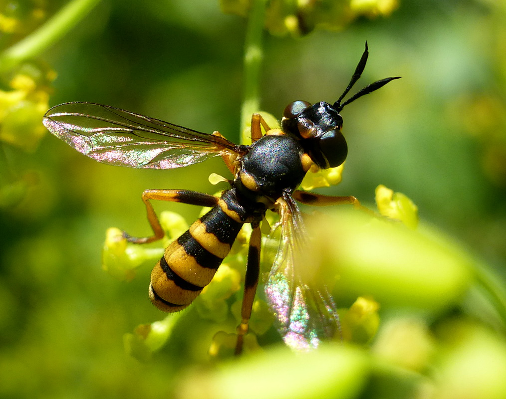 Leopoldius brevirostris location: Slovakia, Banská Bystrica, lúka na vápencovom podklade